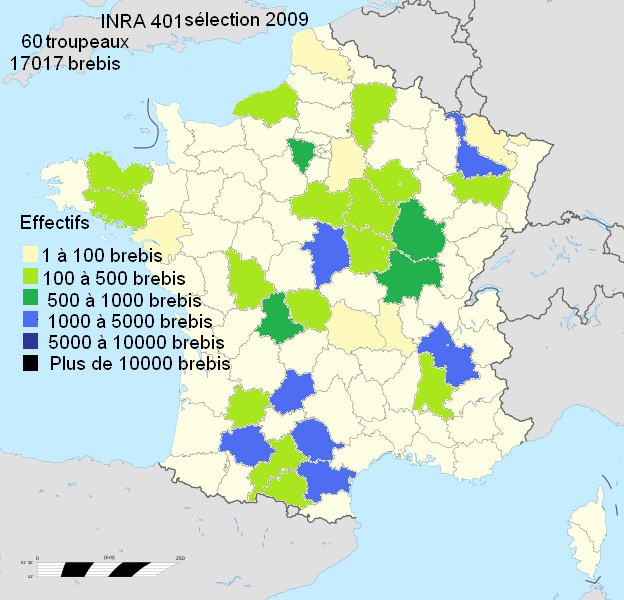 Répartition des troupeaux de sélection INRA 401